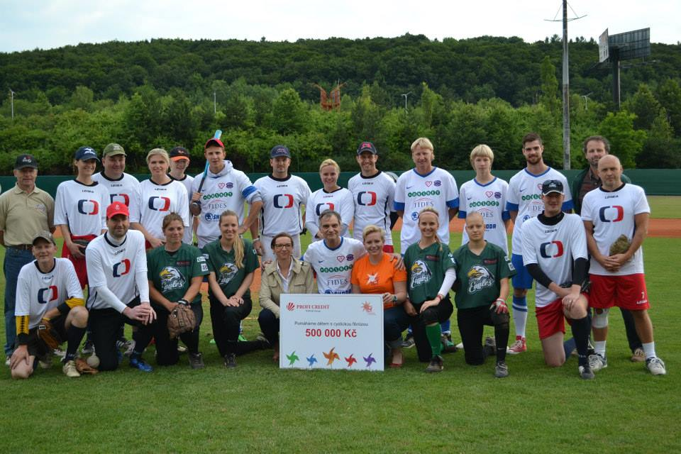 Baseball vydělal 500.000Kč pro Klub nemocných cystickou fibrózou.